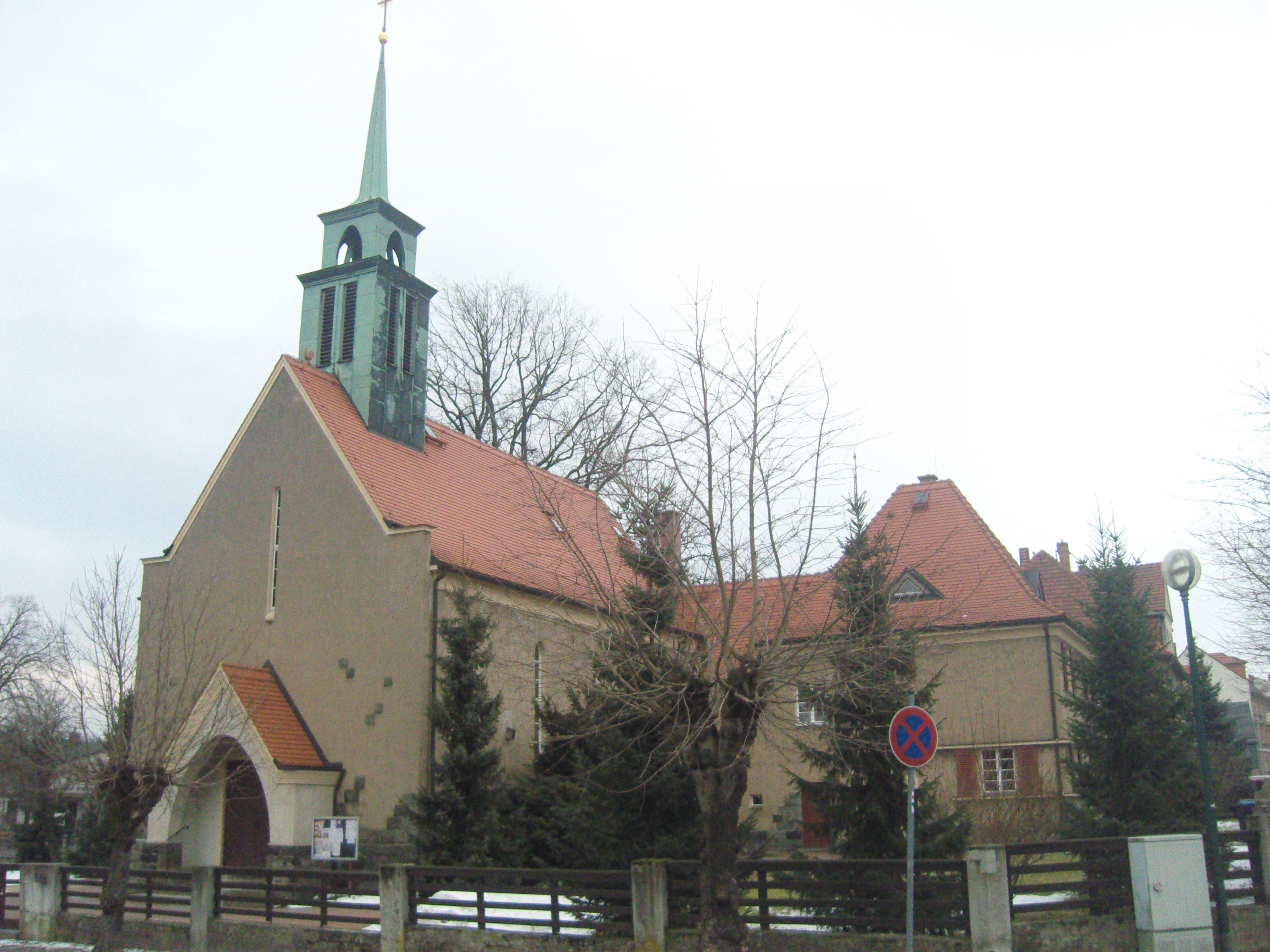 St.-Gertrudis-Kirche (Neustadt in Sachsen)